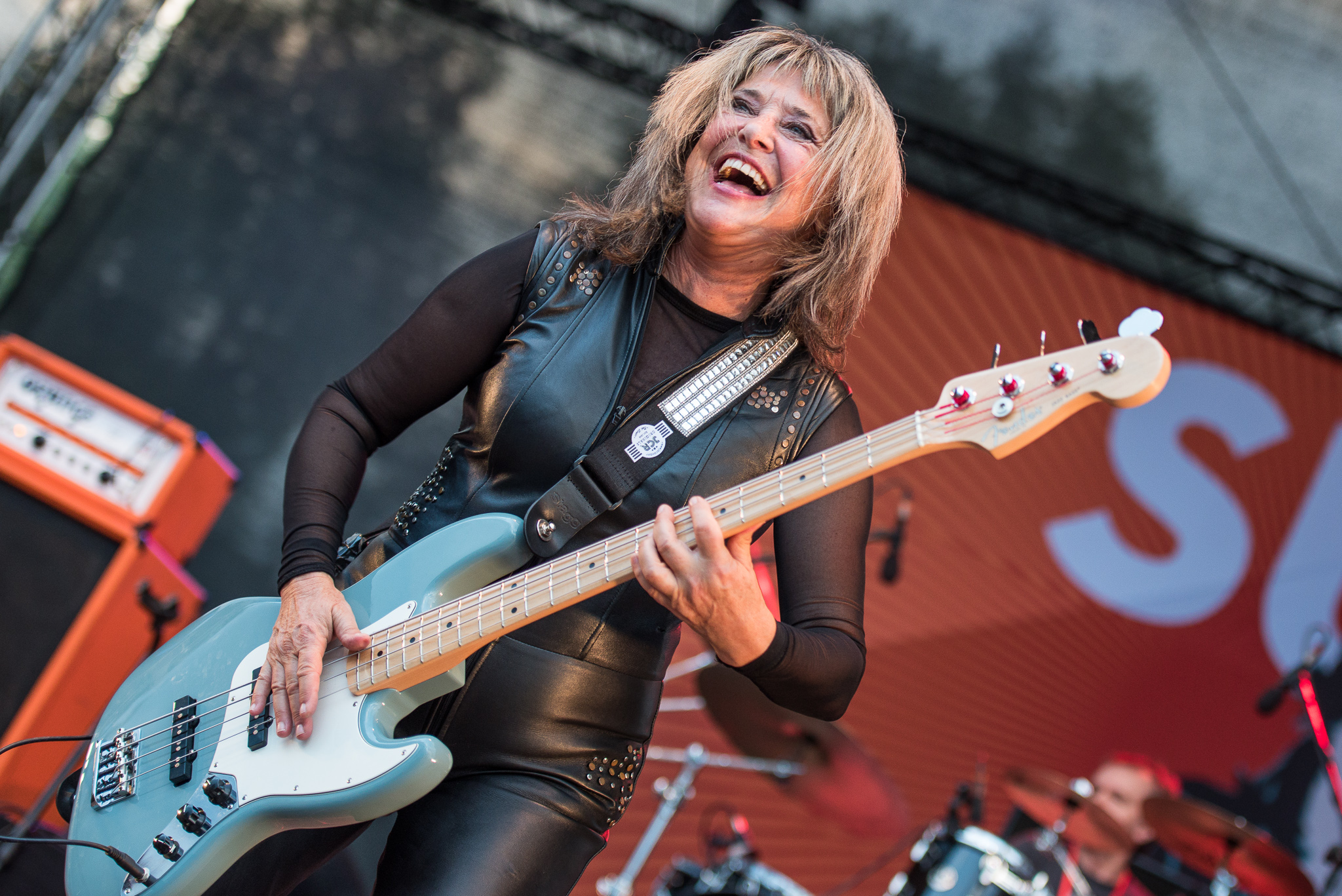 Brombachsee,Concertbüro Franken,Festival,Konzert,Lieder am See,Livekonzert,Livemusik,Musik,Susan Kay Quatro,Suzi Quatro